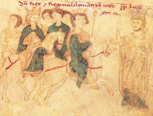 Konstancie Sicilská s manželem Jindřichem VI. a pepžem Luciem III